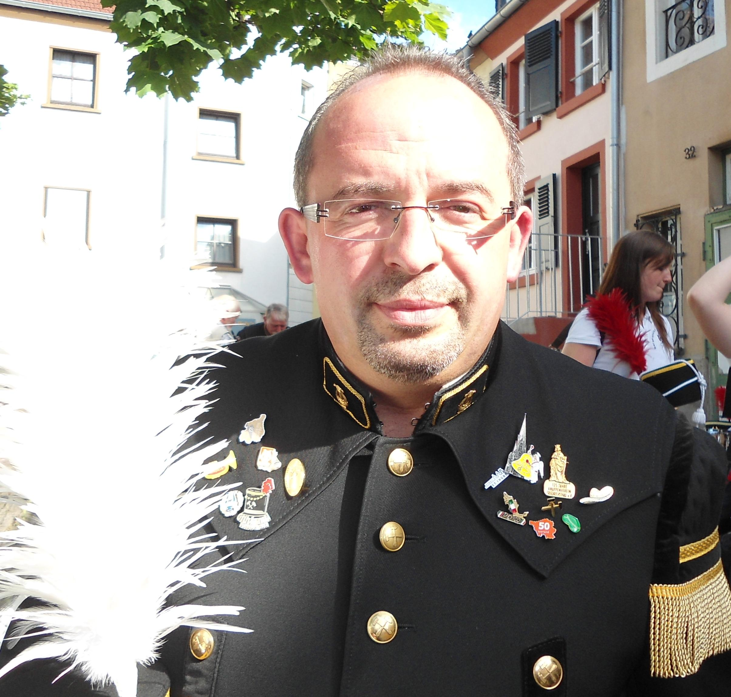 Der Dirigent der Bergkapelle St. Ingbert Matthias Weißenauer